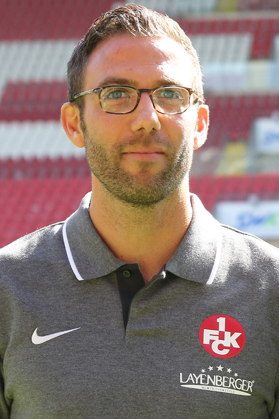 Boris Schommers (Trainer des 1. FC Kaiserslautern)